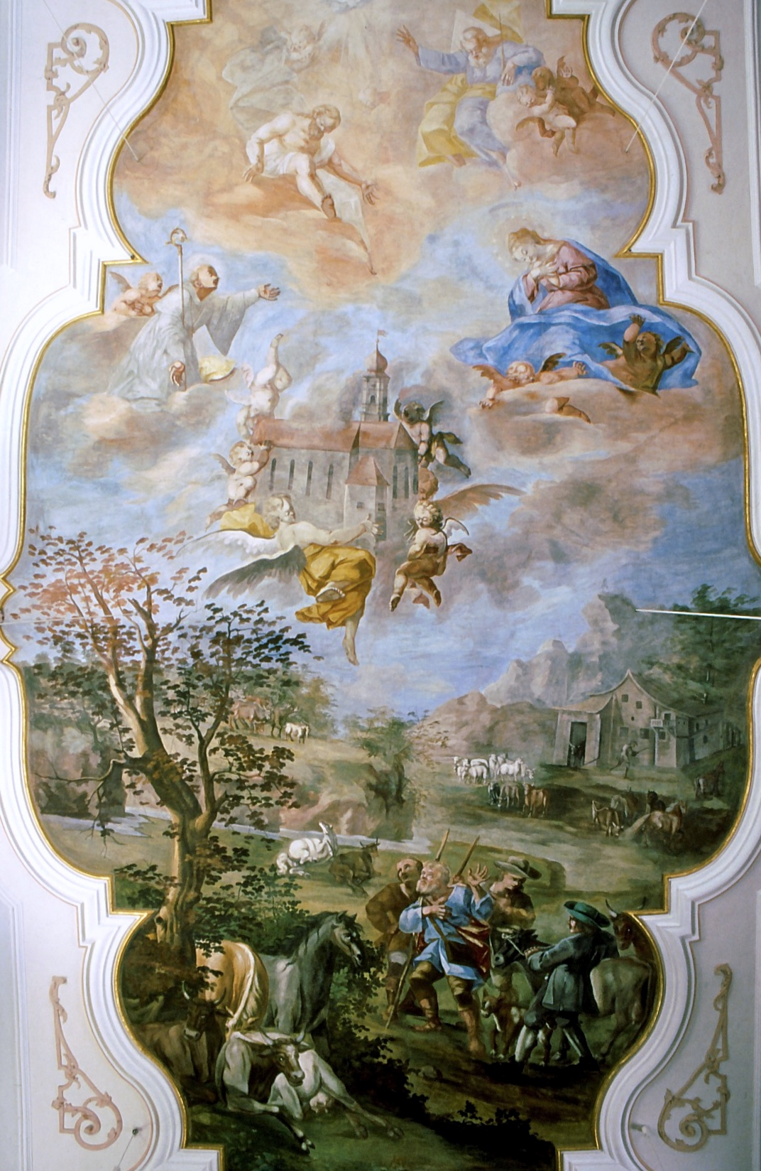 Fresko im Langhaus der Filialkirche St. Leonhard in Pfronten-Heitlern von Bartholomäus Stapf und Johann Heel